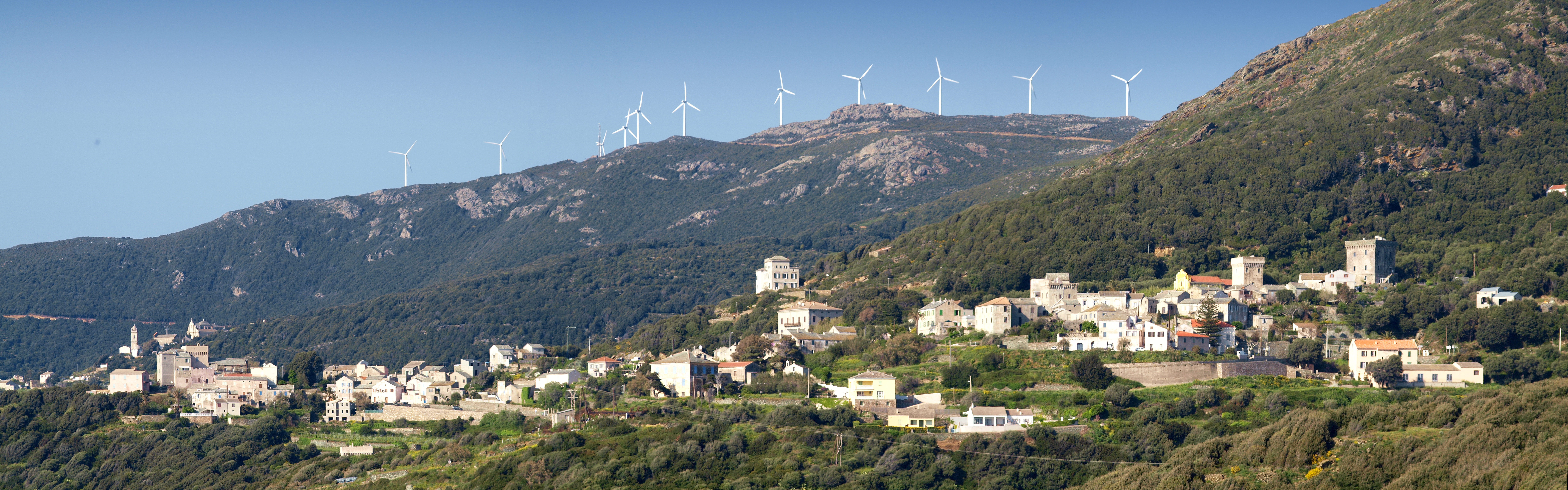 Morsiglia (Corsica) - Vue du village